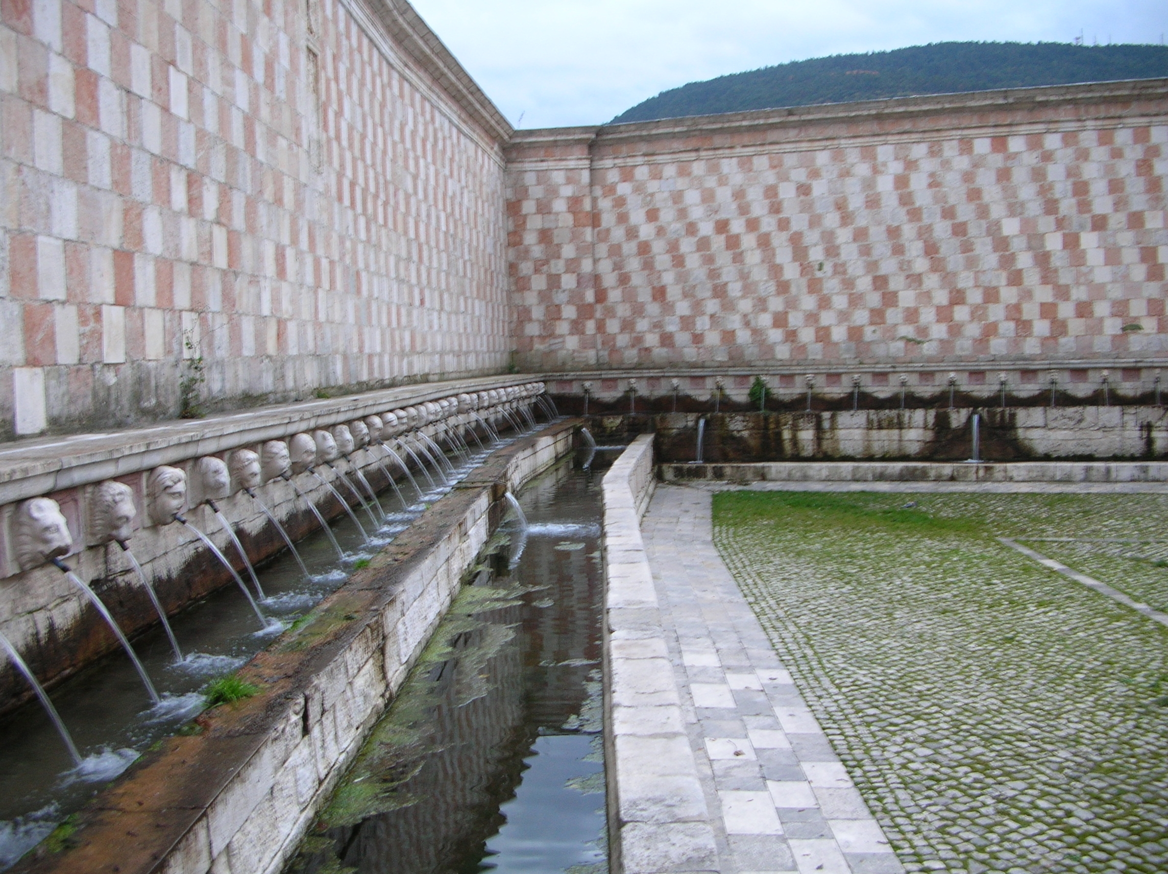 Fontana delle 99 cannelle - Vista di'insieme parete centrale L'Aquila